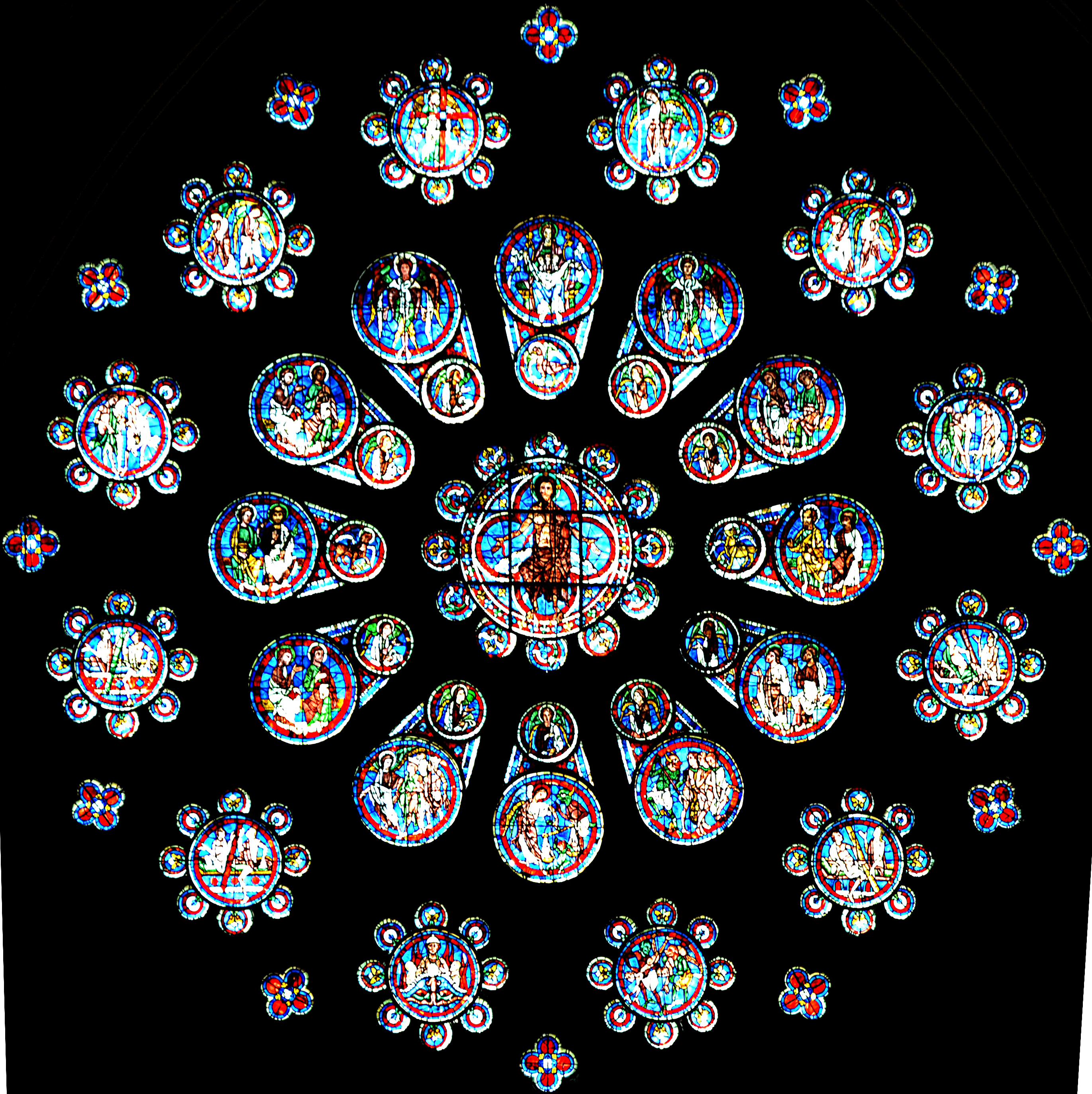 Cathédrale de Chartres (classée, 1862), rose de la façade occidentale le Jugement Dernier datée vers 1215.